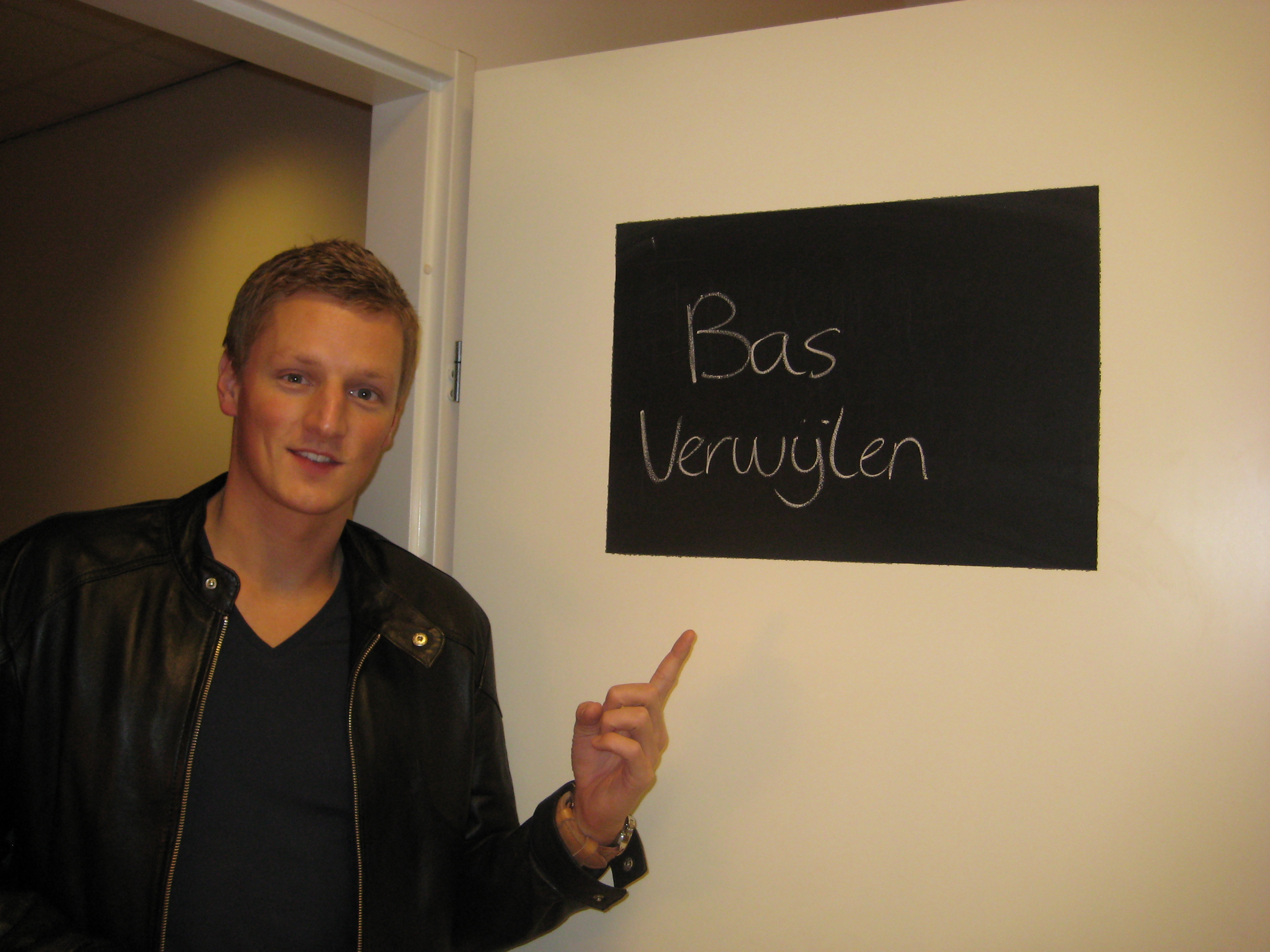 Bas net voor zijn optreden bij de MaDiWoDoVrijdagshow met Paul de leeuw en Filimon Wesselink